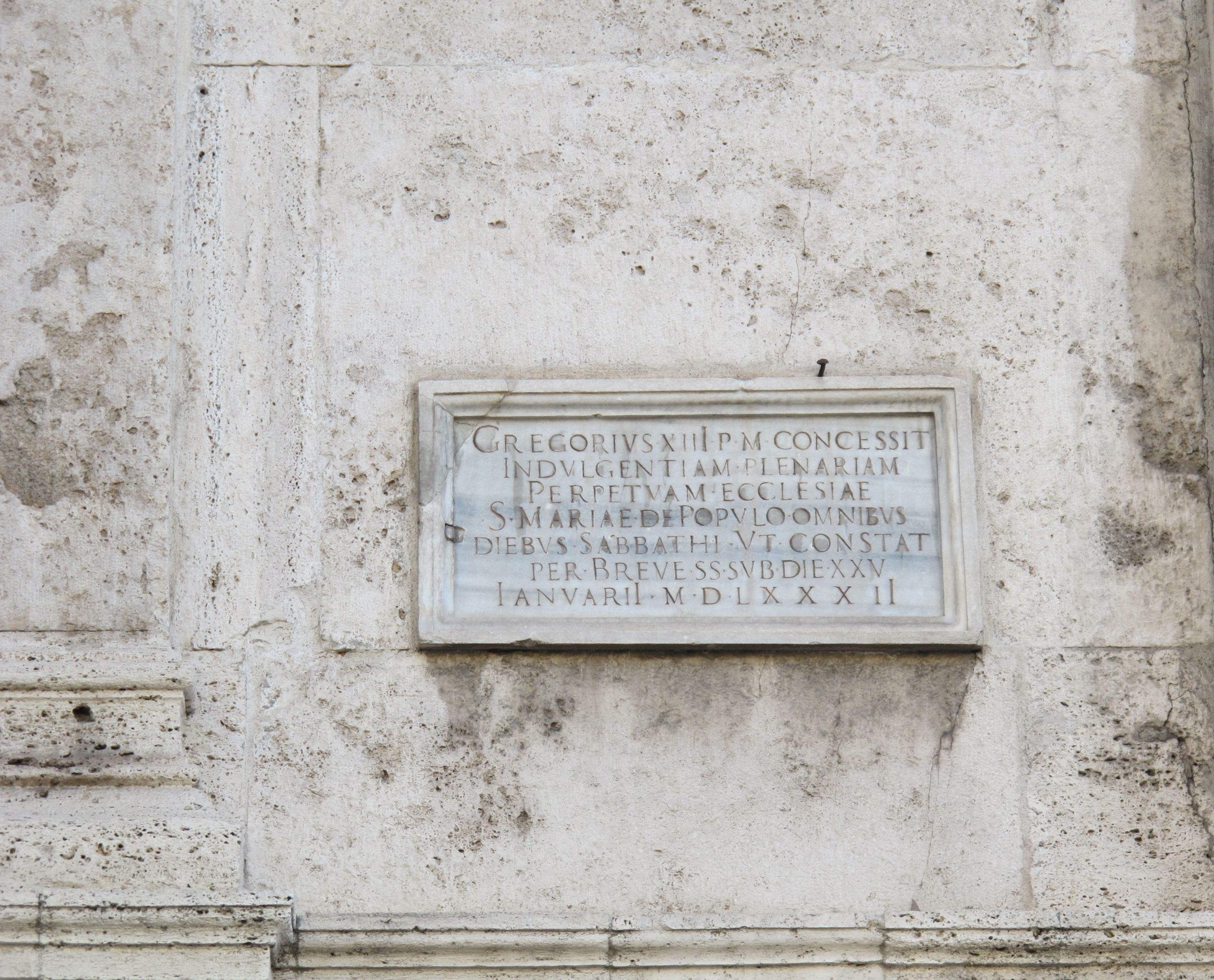 Santa maria del popolo, facciata, targa